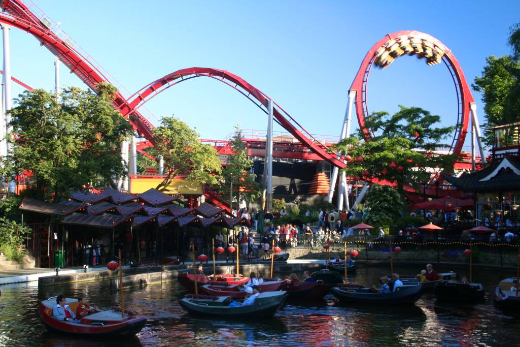 Amusements in Tivoligardens